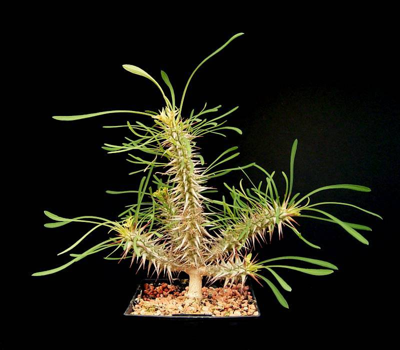 Euphorbia rossii